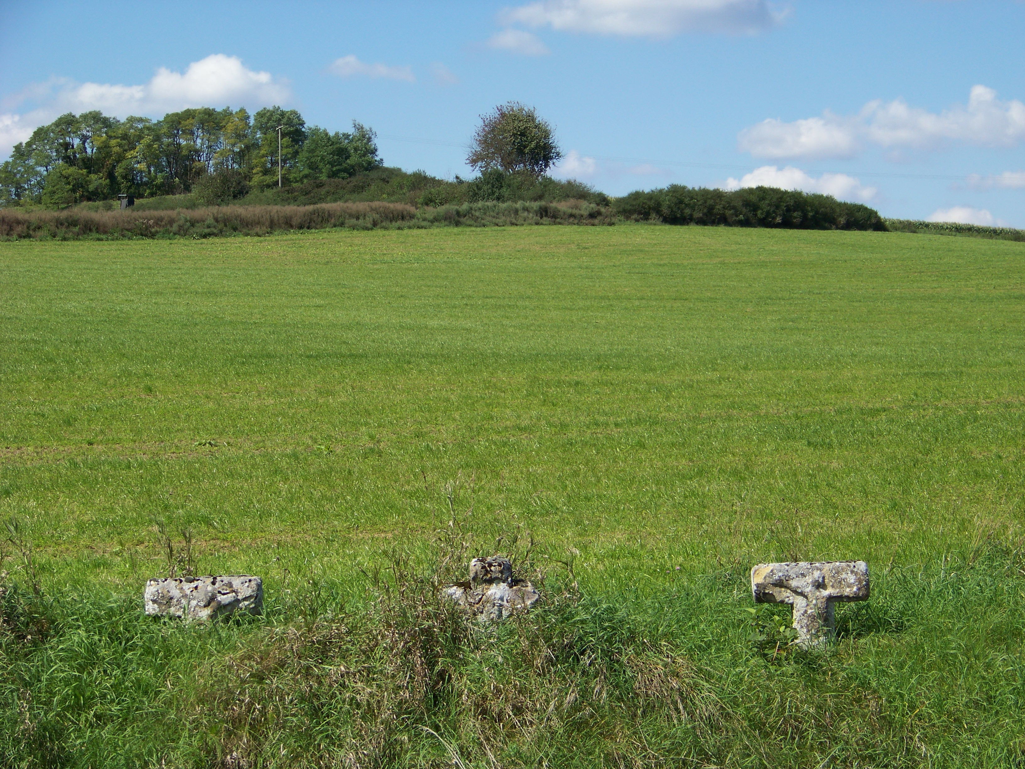 Abensberg, Pullach, Landkreis Kelheim. Drei Steinkreuze an der Straße nach Abensberg aus dem 16./17. Jahrhundert. Die Kreuze sind größtenteils eingesunken. Die Figuren Christi und der Schächer sind auf Vorder und Rückseite roh eingearbeitet. Das Kreuz Christi hat die gewöhnliche Form. Die Kreuze der Schächer haben T-Form.